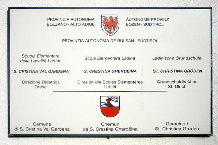 3 sprachige tafel